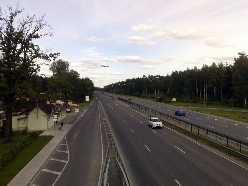 A10 near Rīga, Latvia